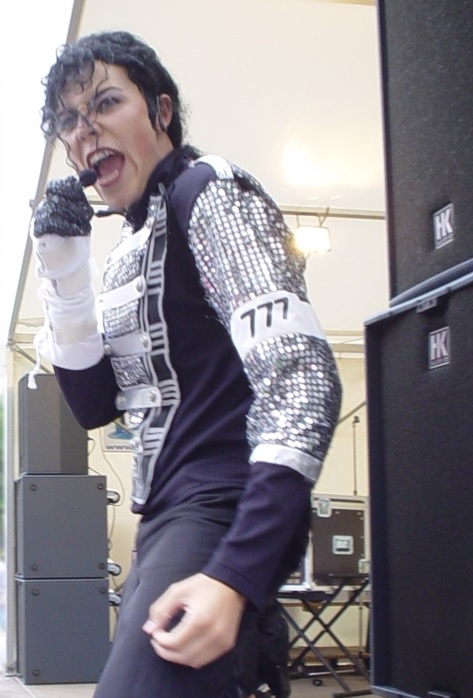 Michael Rouven als Michael Jackson